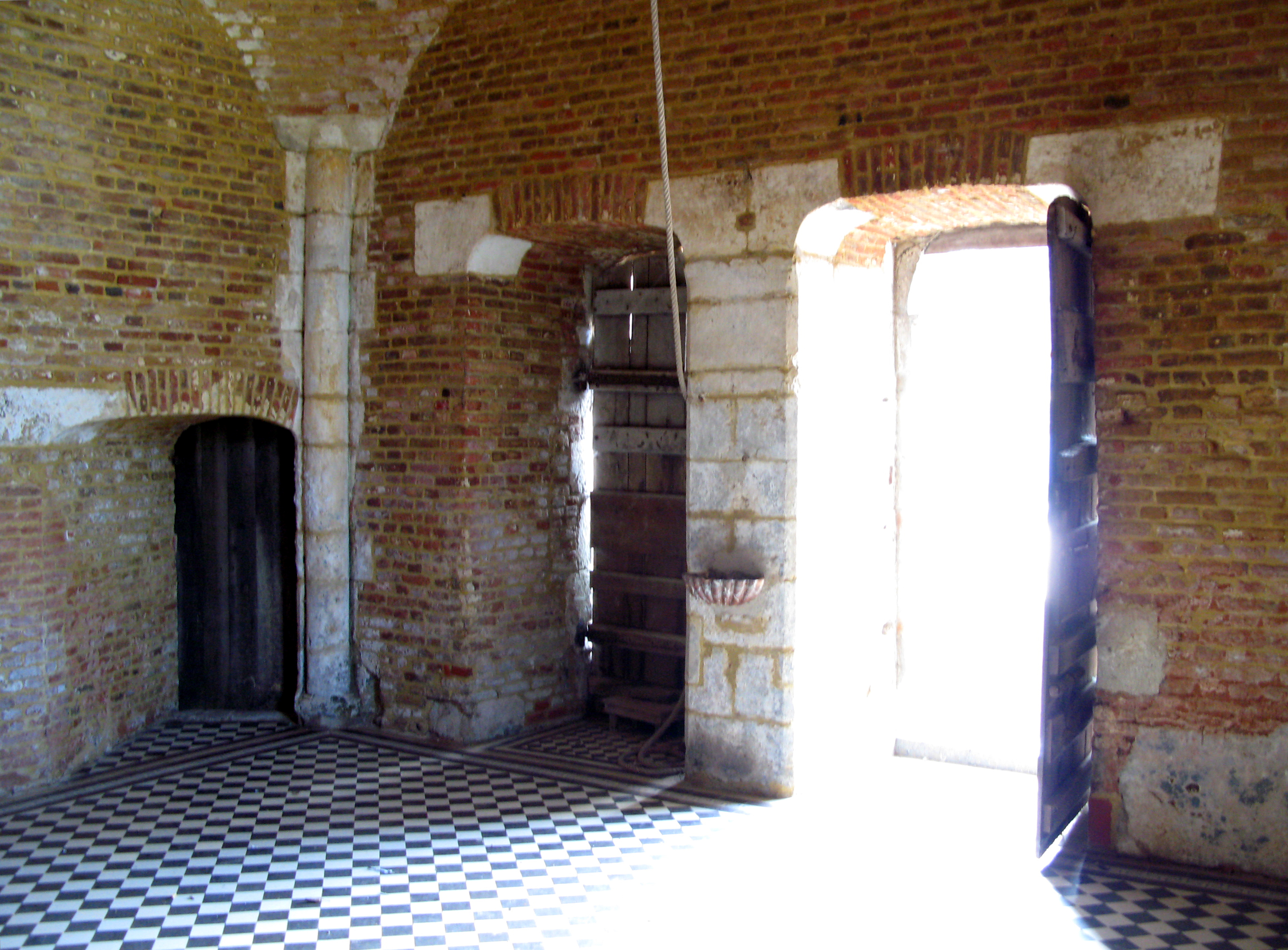 Parfondeval (Aisne, France) - L'église fortifiée (entrée).